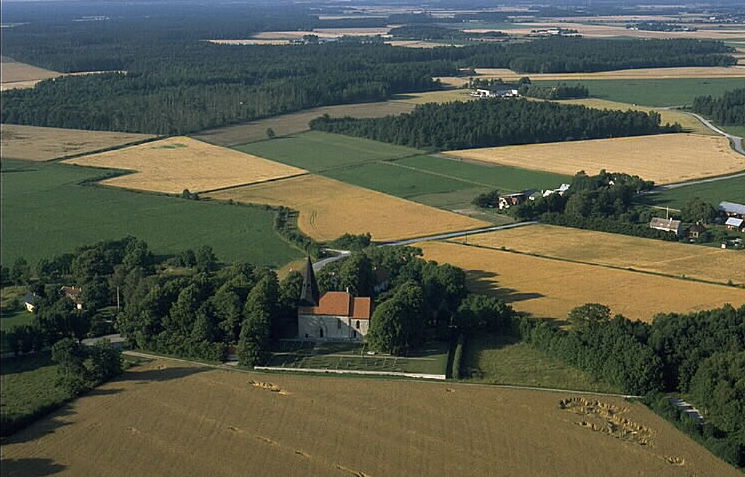 Motiv: Atlingbo kyrka Nyckelord: Flygbilder, Riksintressen Kategori: KyrkomiljöAtlingbo kyrka